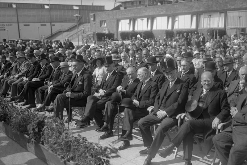 Die Eröffnung der grossen deutschen Funkausstellung 19.08. - 28.08.1932 in den Ausstellungshallen am Kaiserdamm in Berlin ! Die Reihe der Prominenten von rechts nach links: Der Zweite von rechts, Reichsrundfunkkommissar Dr. Hans Bredow dann Reichsinnenminister von Gayl, Reichsrundfunkkommissar Dr. Erich Scholz (*1882, †1954), Polizeipräsident Dr. Melchert, und Oberbürgermeister Dr. Sahm, während der Eröffnungsfeier.